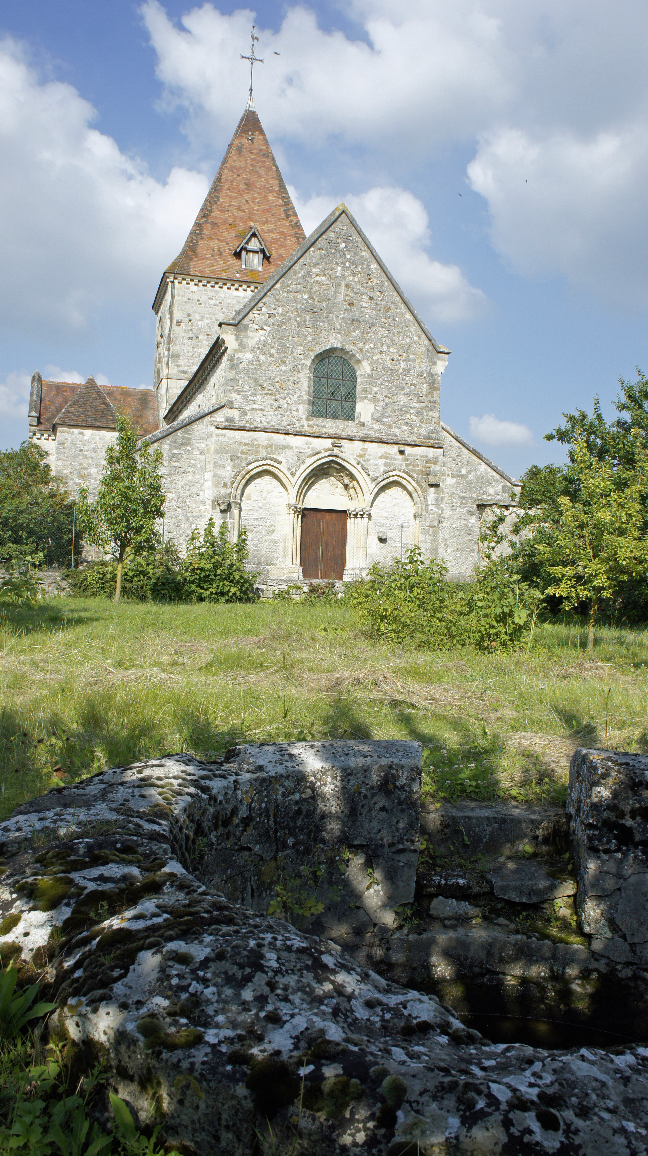 Vue de l'église et du baptistère d'Ormes depuis l'ouest.